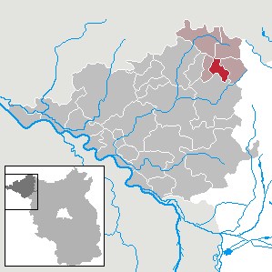 Gerdshagen in Brandenburg (Country) - District Prignitz